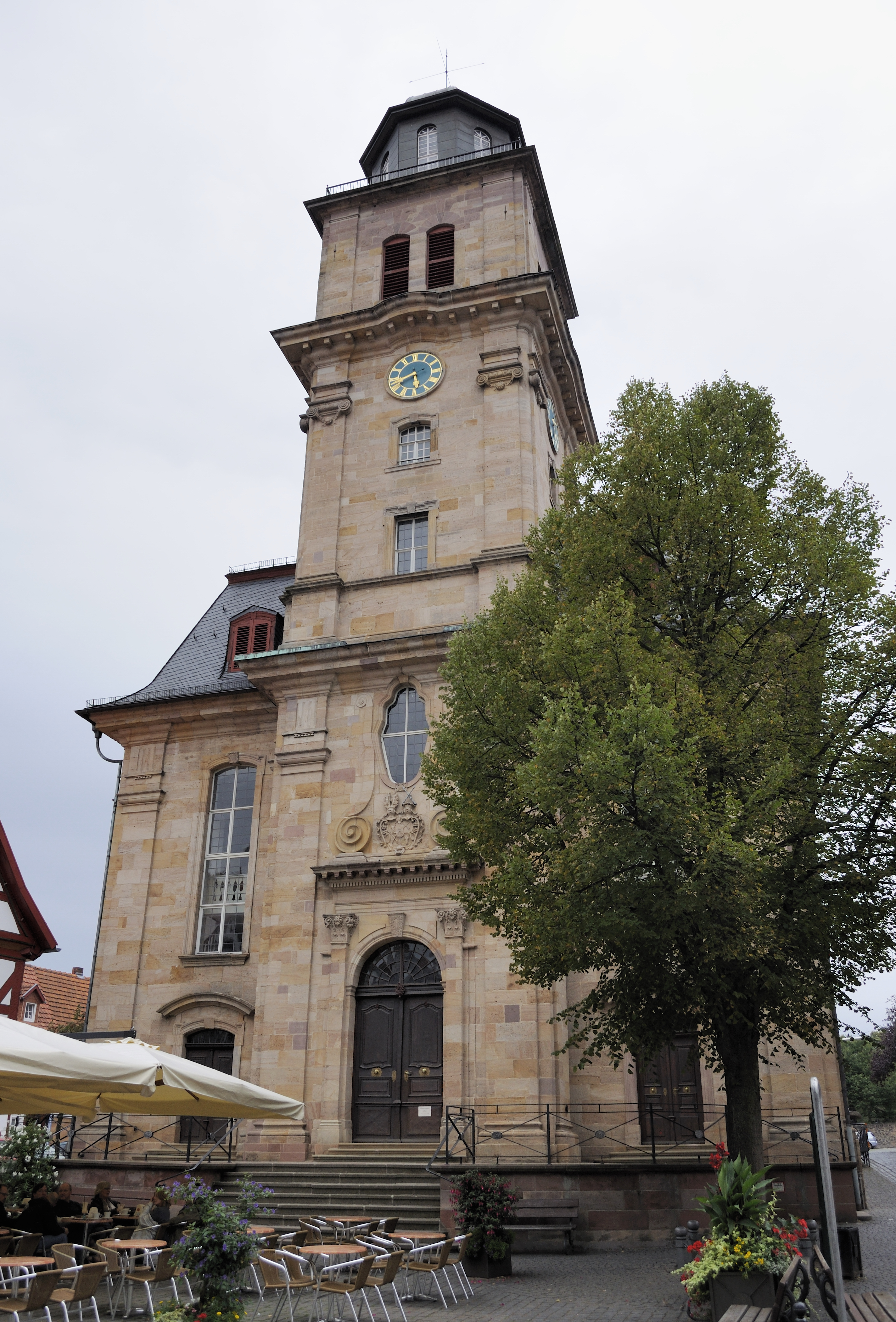 Dieses Foto entstand im Rahmen des Projekts Wiki Loves Monuments Mittelhessen, das aus dem Community-Projektbudget von Wikimedia Deutschland e. V. gefördert wurde.